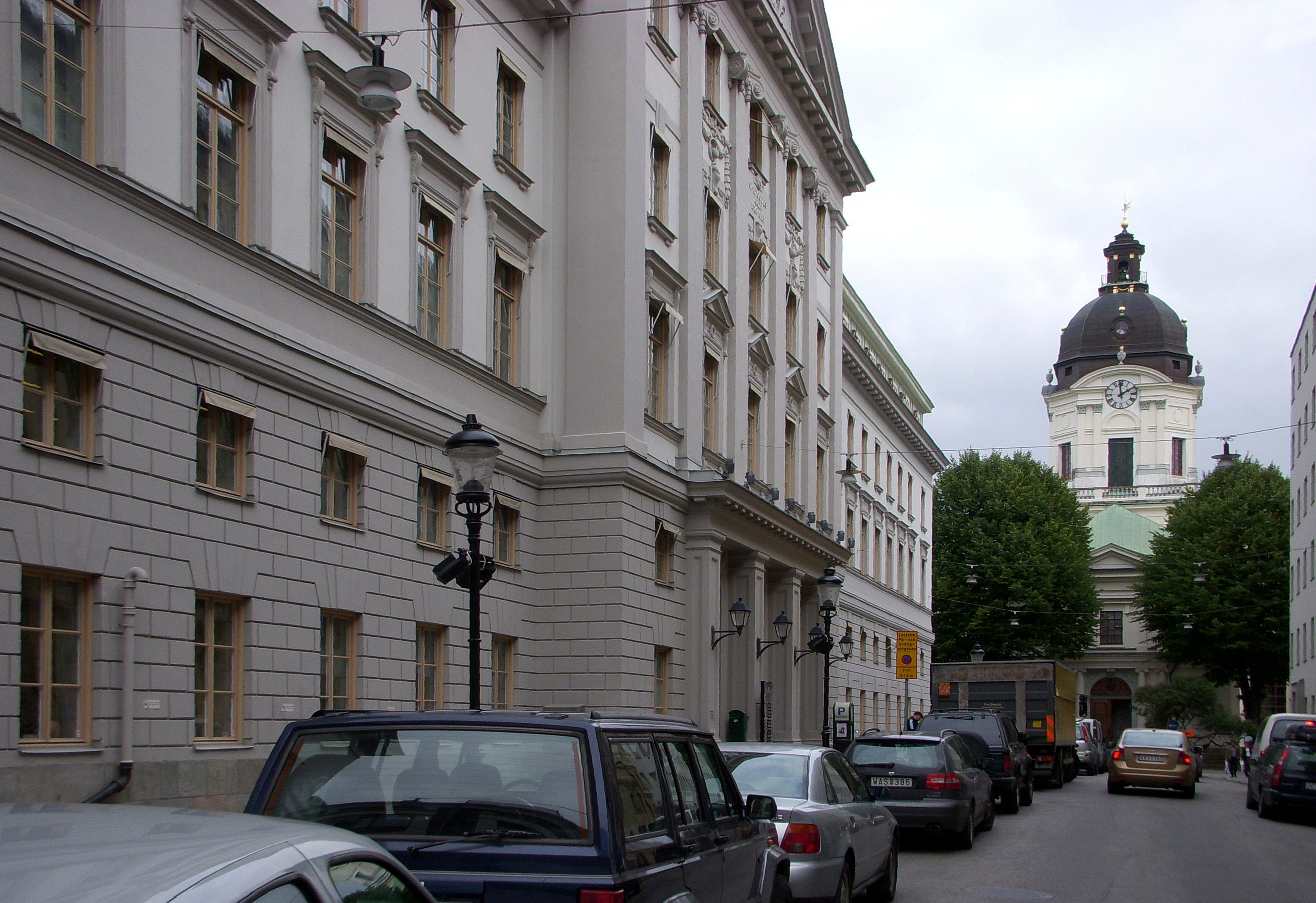 Wallingatan i Stockholm, vy mot öst